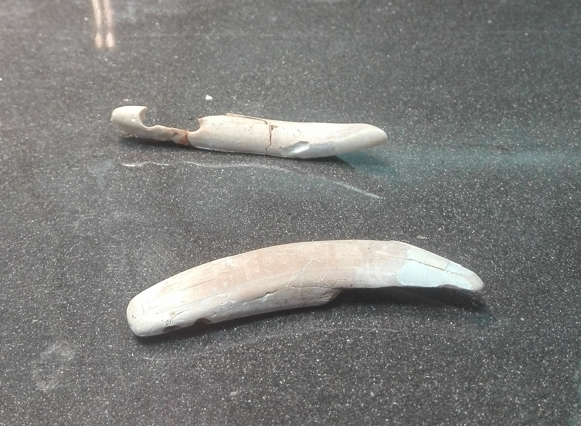 Deux dents de lamantins des Caraïbes (Trichechus manatus) percées, exposées au musée Edgard Clerc du Moule (Guadeloupe). Trouvées sur le site de Taliseronde à Marie-Galante (fouilles Guy Slozinsky) et datées du Céramique récent / tardif (IXe - XVIe siècle). Ces pièces sont exposées accompagnées de la légende suivante : " Ces deux dents ont été percées, certainement pour être portées comme pendentif. Les vestiges d'os ou de restes de lamantins sont rarissimes dans les fouilles archéologiques, et ne sont jamais présents dans les dépotoirs (zones de rejet des restes alimentaires), semblant démontrer que les Amérindiens ne consommaient pas la viande de cet animal. Bien au contraire, le fait que les seuls éléments de lamantin retrouvés soient des pièces exceptionnelles et appartenant à la sphère culturelle symbolique, montre que ces animaux devaient avoir une place particulière dans la pensée spirituelle et l'imaginaire des Amérindiens. "